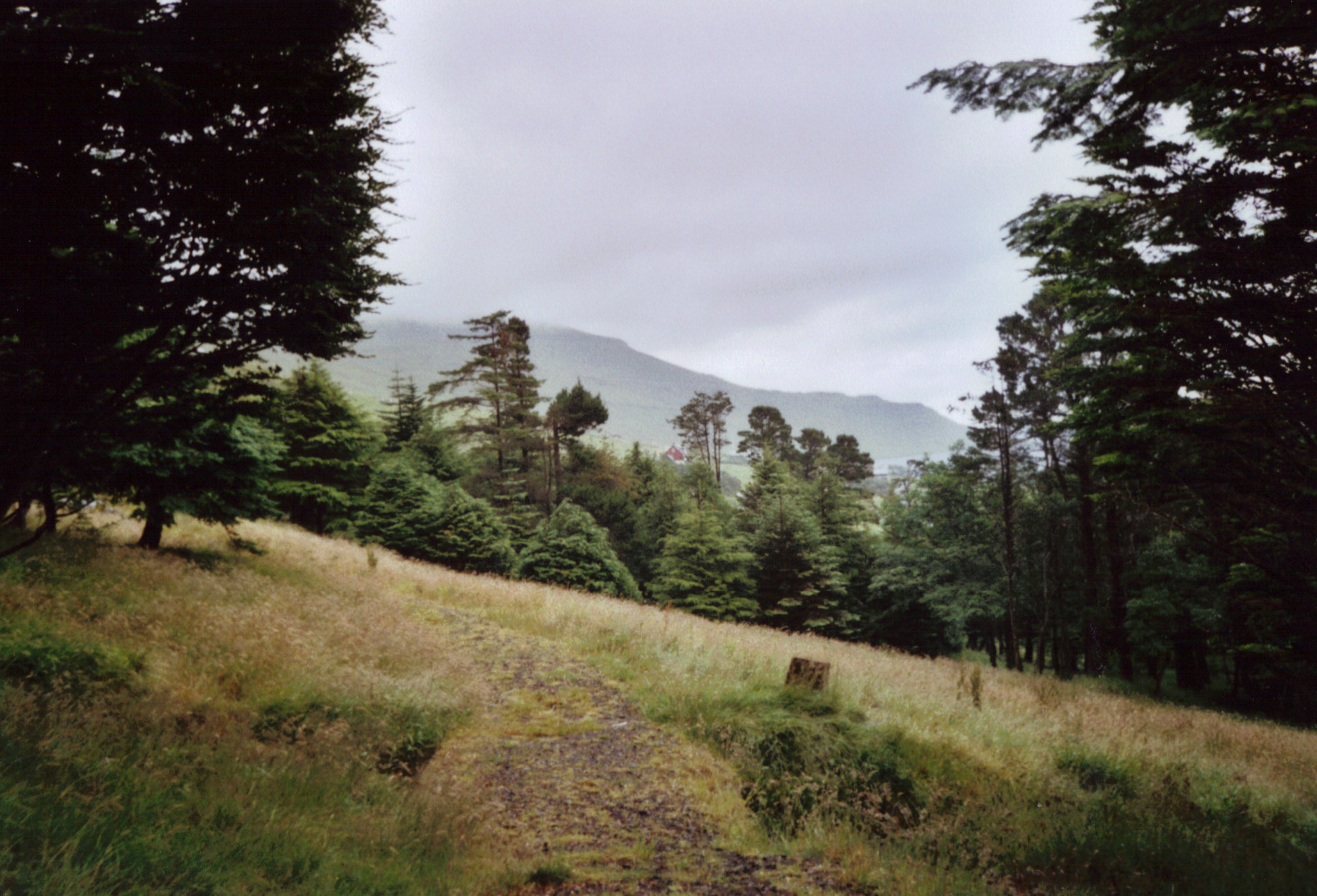 Im Wald von Selatrað gibt es mehrere Wanderwege.